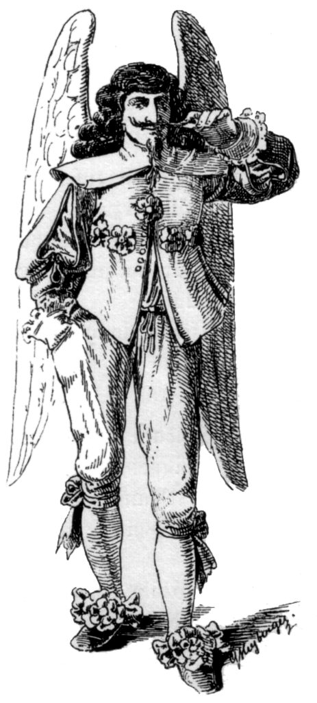 Der Franzosenengel, Illustration zu Sebastian Sailers Der Fall Luzifers